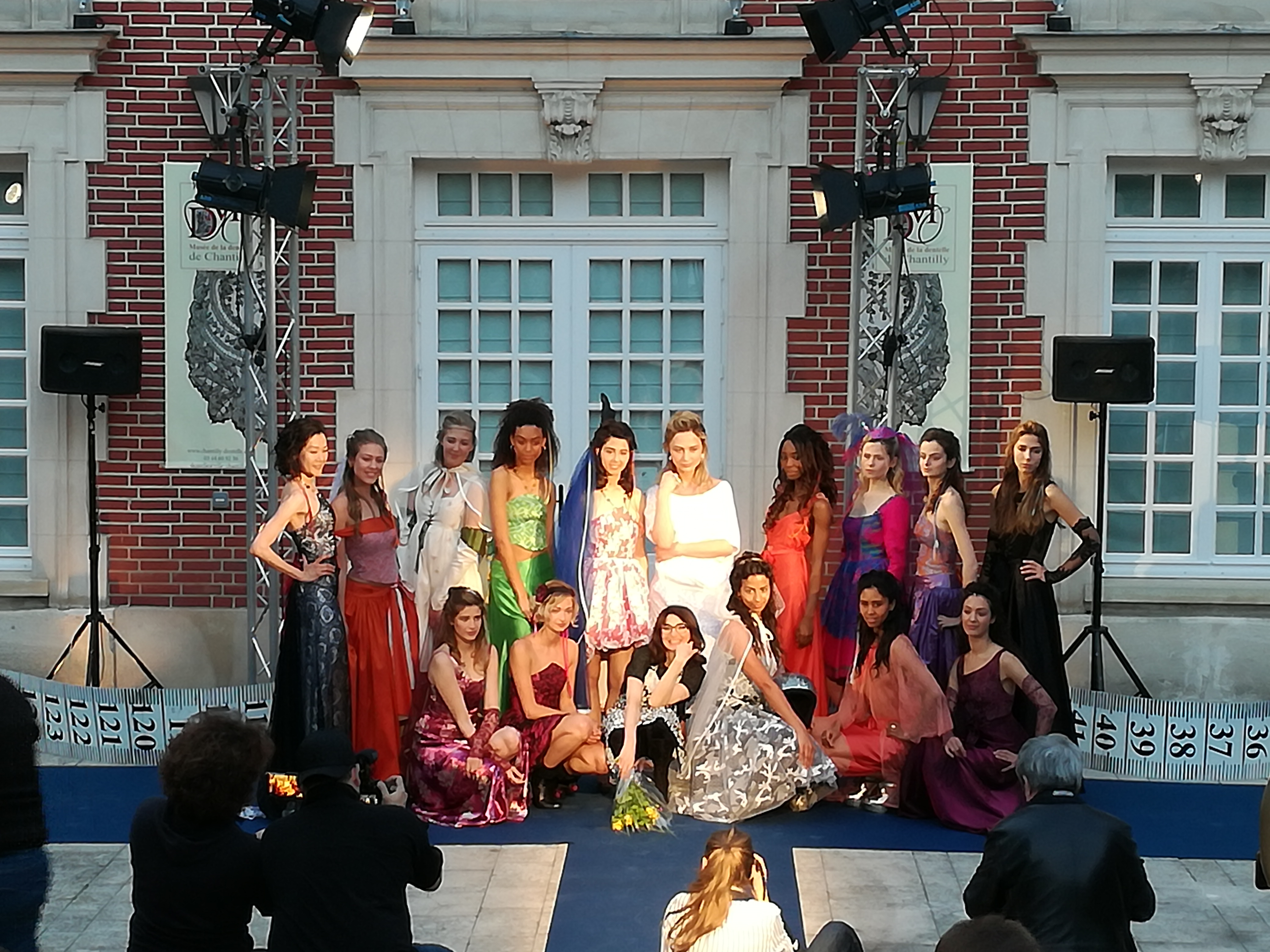 Défilé de mode organisé à l'occasion du "Printemps des arts", devant le musée de la dentelle de Chantilly.